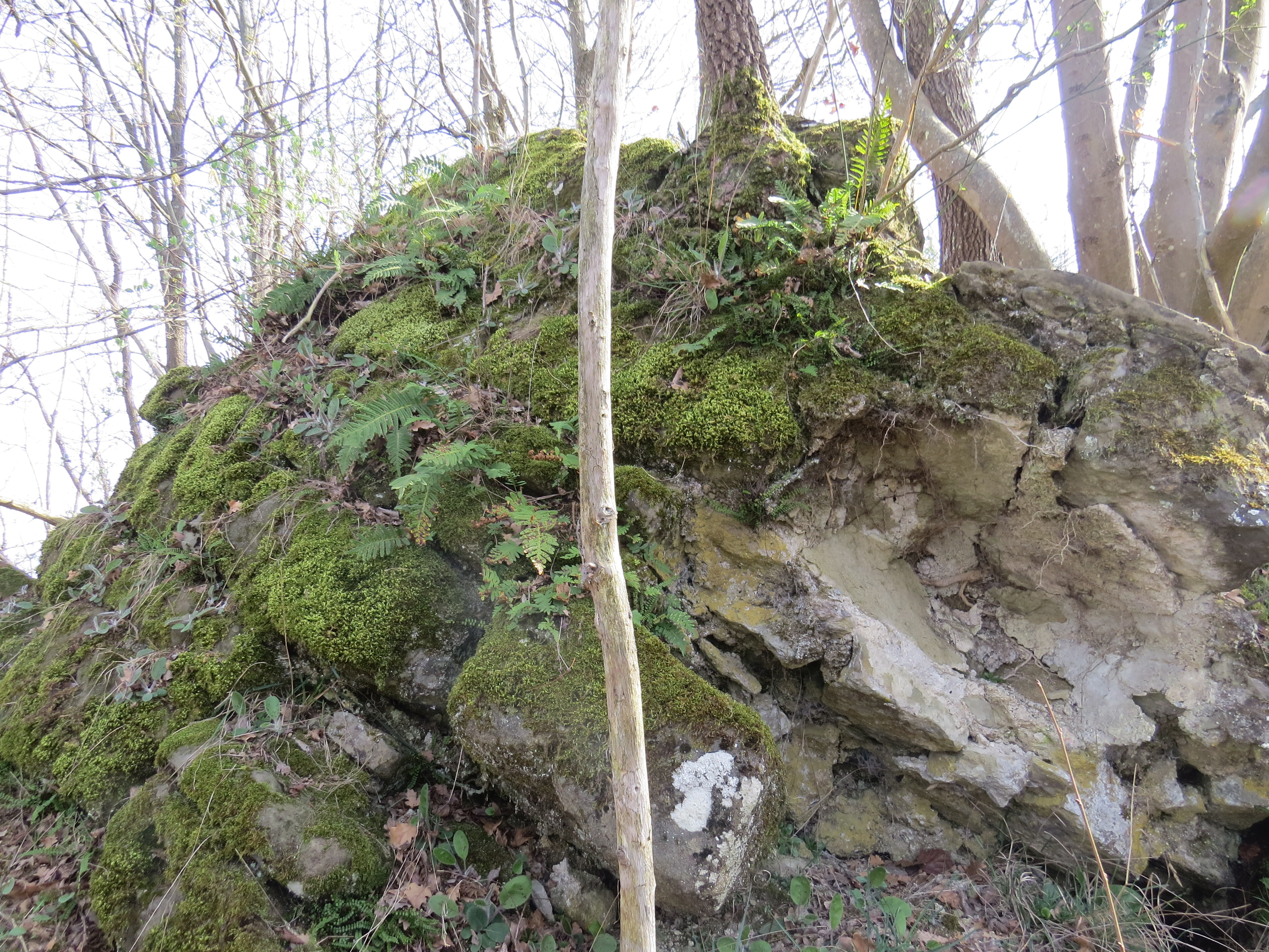 Resti del basamento di una torre del castello di Mioglia